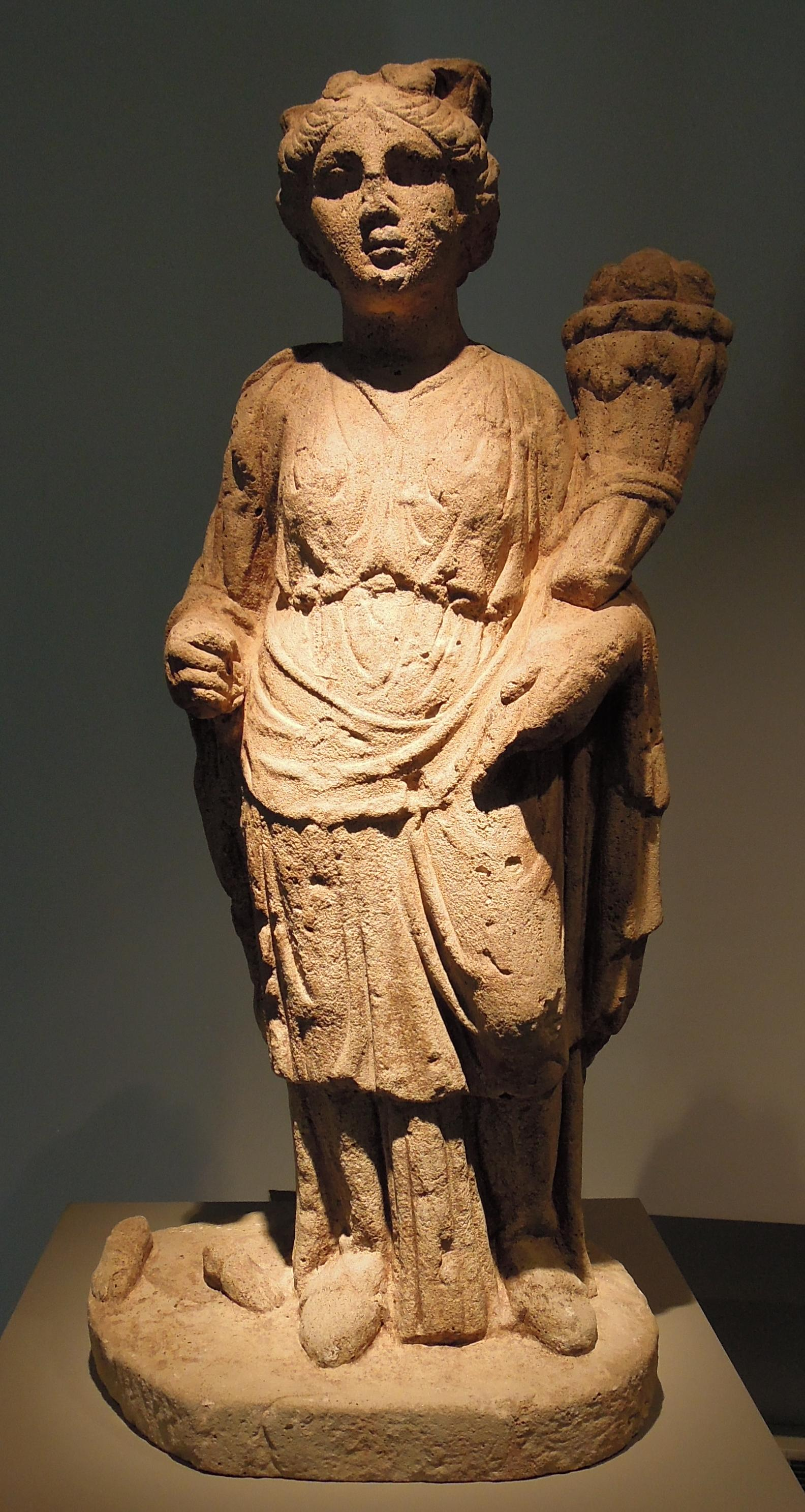 Vor- oder Frühgeschichtlicher Fund aus dem Saarland